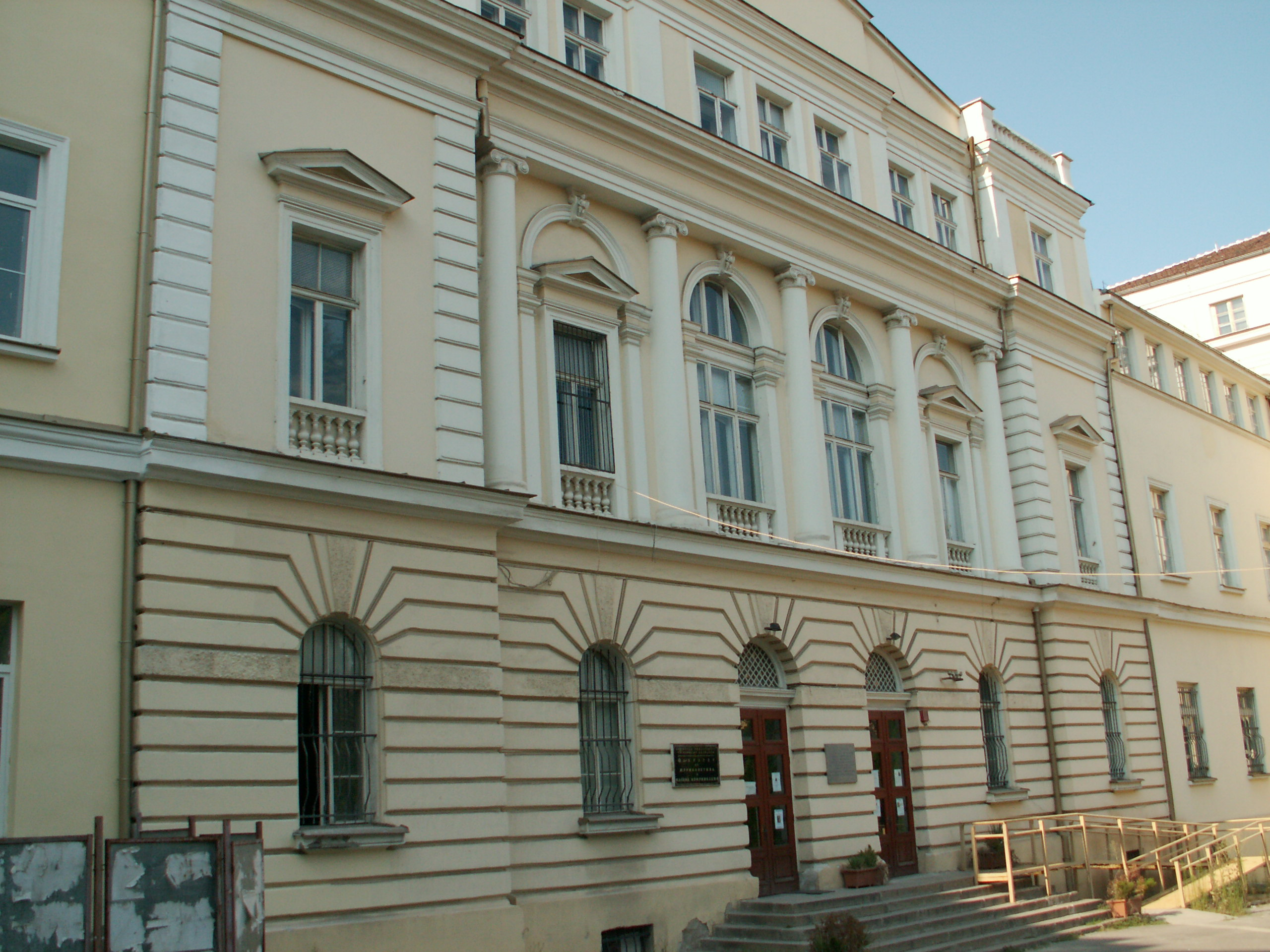 Façade de la faculté de journalisme et de communication de masse de l'université de Sofia